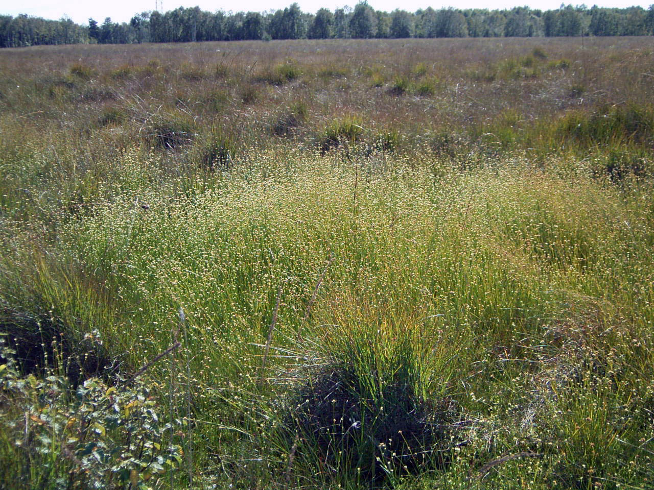 Torfmoos-Schwingdecke mit Blühaspekt von Weißem Schnabelried (Rhynchospora alba) vorne; Schnabelbinsen-Gesellschaft in einer Schwingmoor-Verlandung in der Nordwestdeutschen Tiefebene (Niedersachsen)